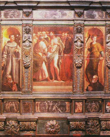 Stefano dall'Arzare - Polittico di S Tommaso - Albignasego pala d'altare